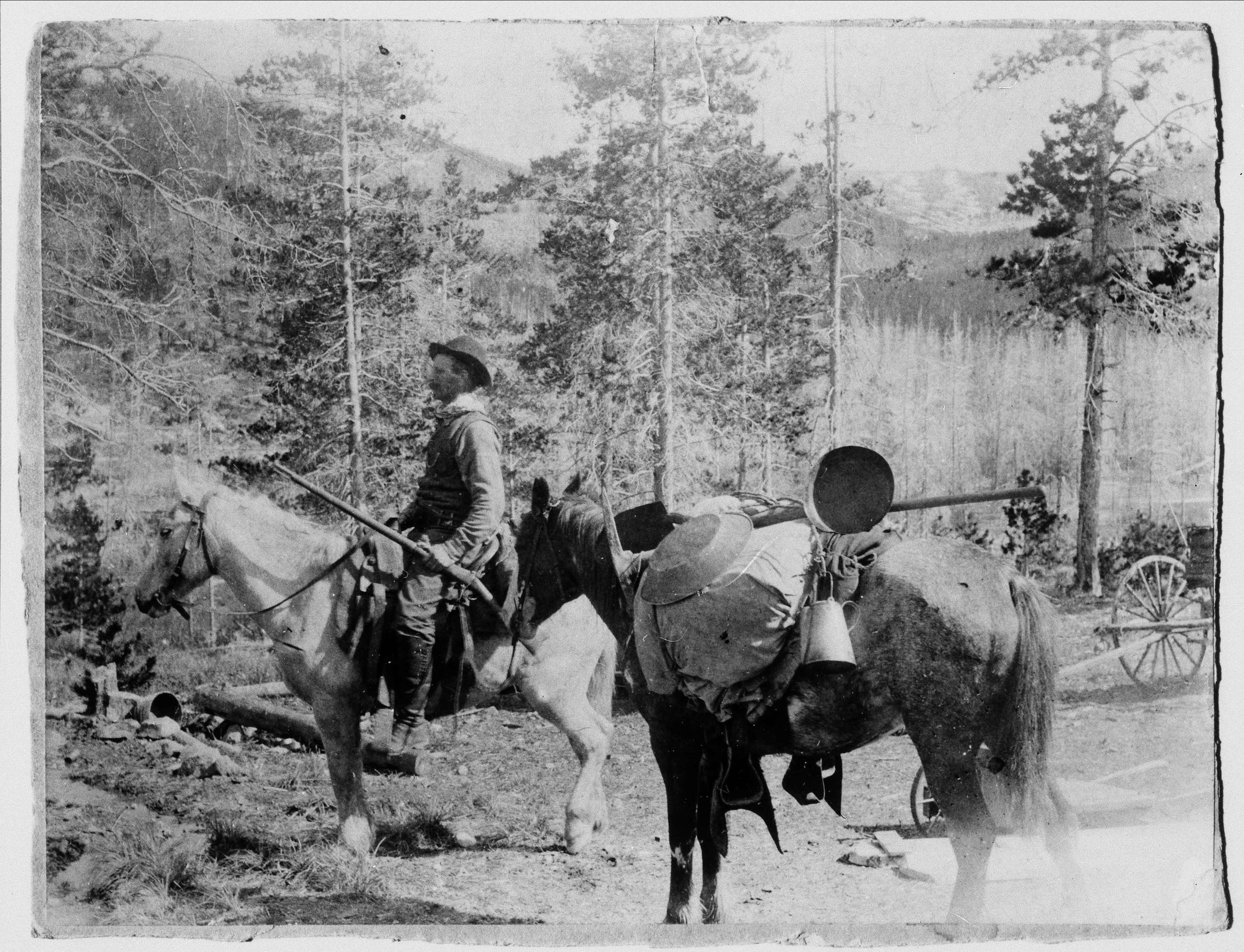 Emigration. Svenskar i Amerika. Guldvaskare vid Black Foots River, Montana. Migration Man Djur : Husdjur Bergsbruk/gruvdrift